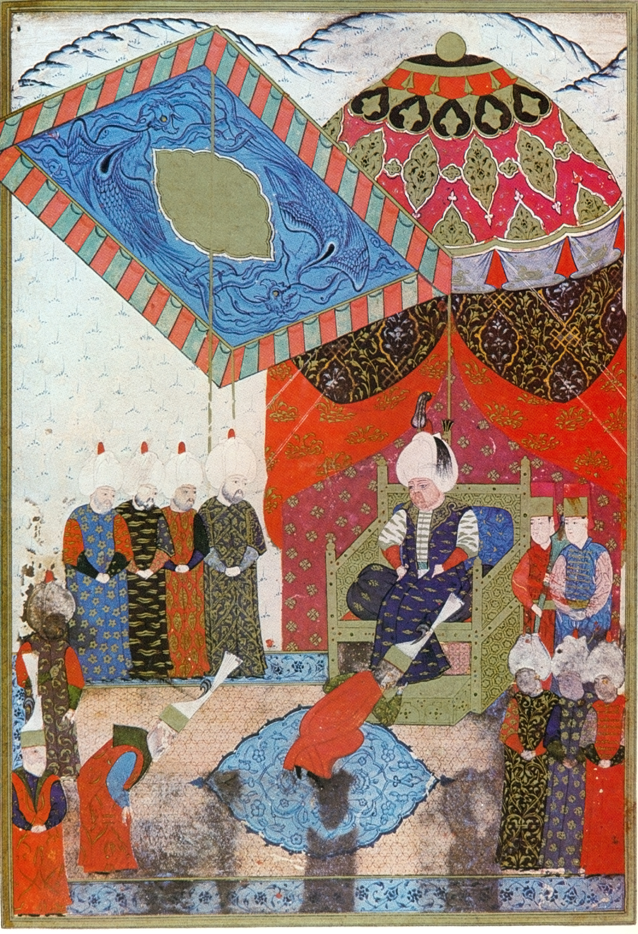 double miniature